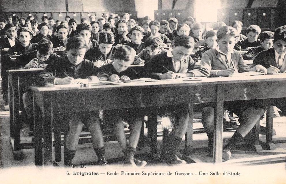 École Primaire Supérieure de garçons de Brignoles (Var), carte postale ancienne (non grevée de droits).